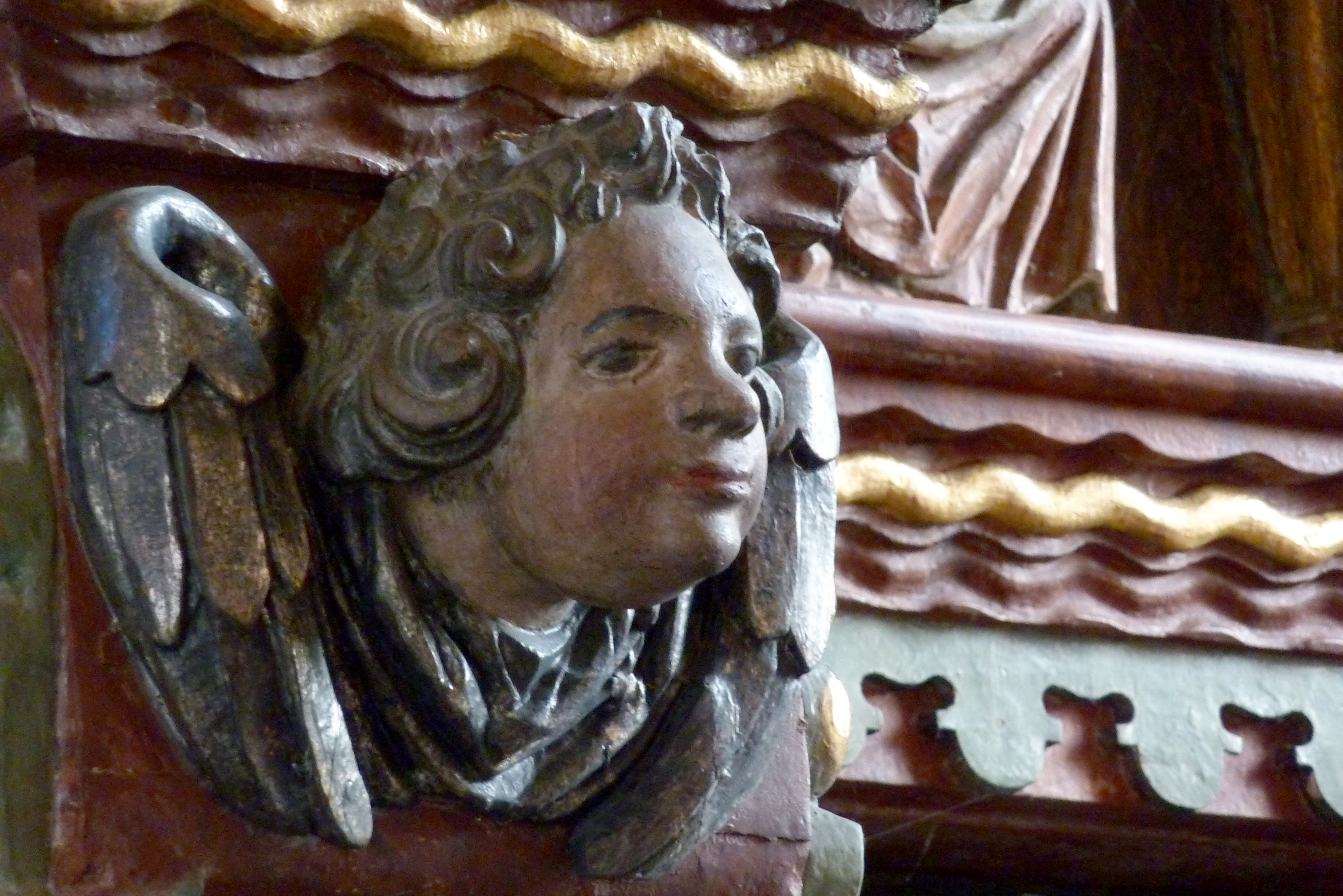 Katholische Wallfahrtskirche Mater Dolorosa in Driesch, einem Ortsteil von Lutzerath im Landkreis Cochem-Zell (Rheinland-Pfalz), Bitter-Leidens-Altar, von Bartholomäus Hammes aus Alflen um 1672 geschaffen; Engelskopf